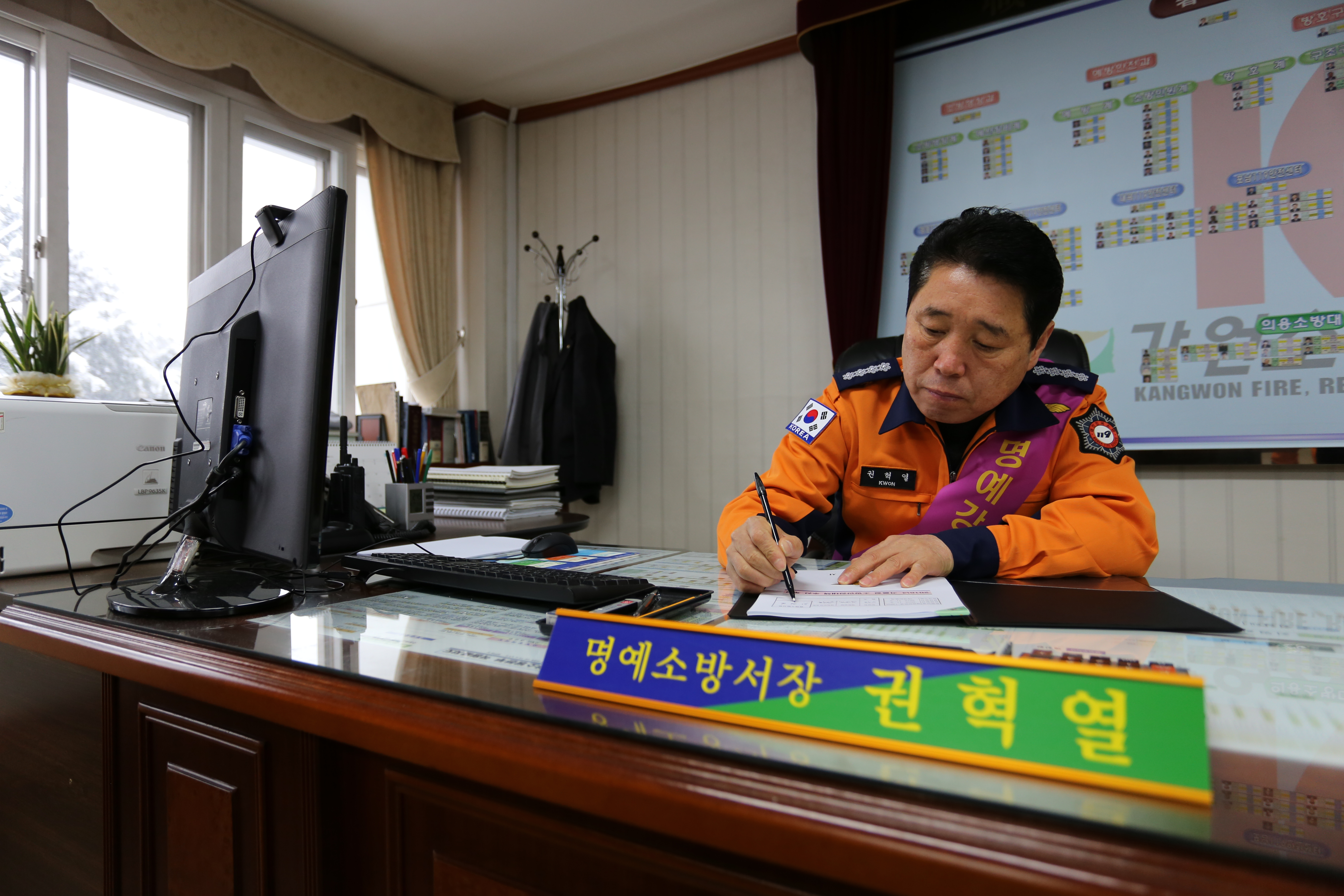 2016년 12월 27일 강원도의회 부의장 권혁열 강릉소방서 명예소방서장 위촉 행사